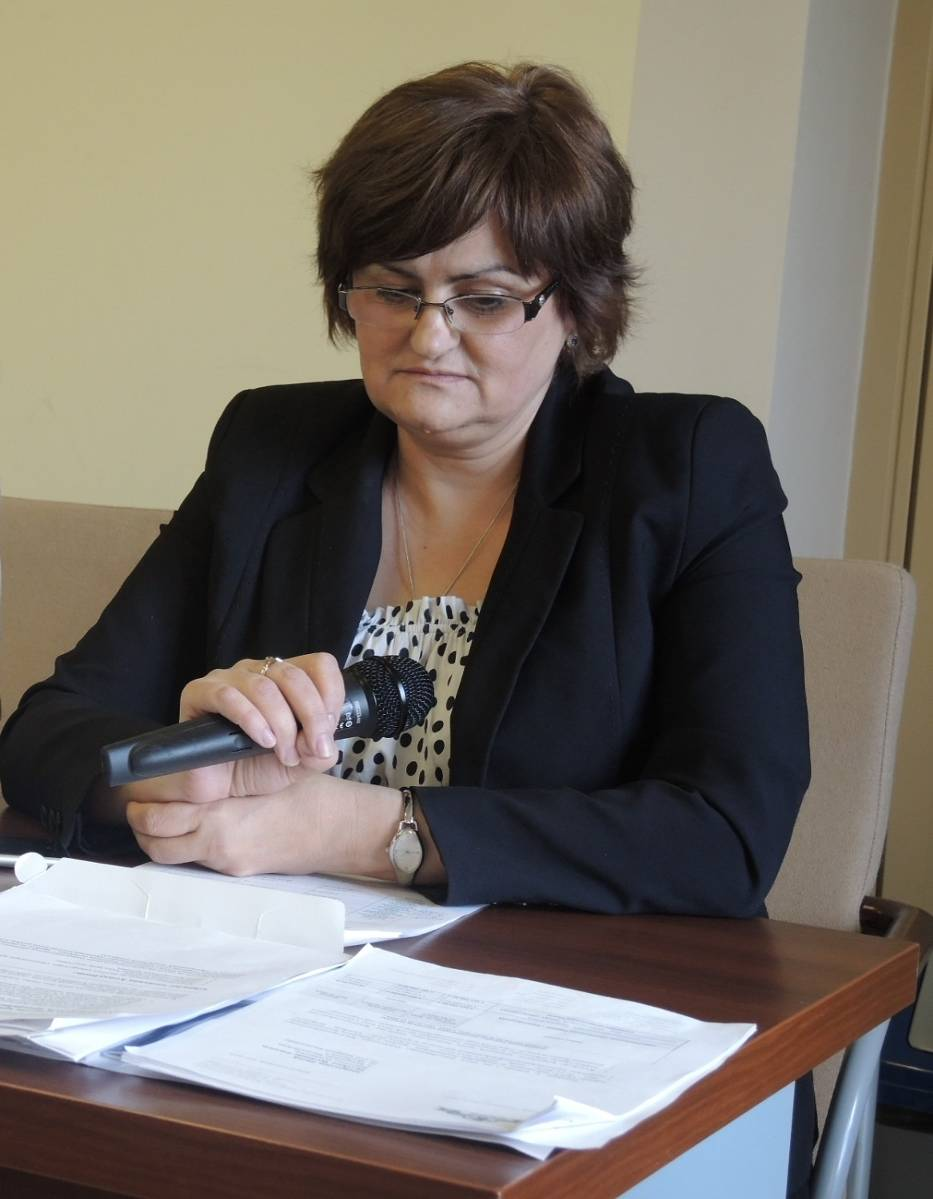 Dyrektor szpitala Anna Skierkowska